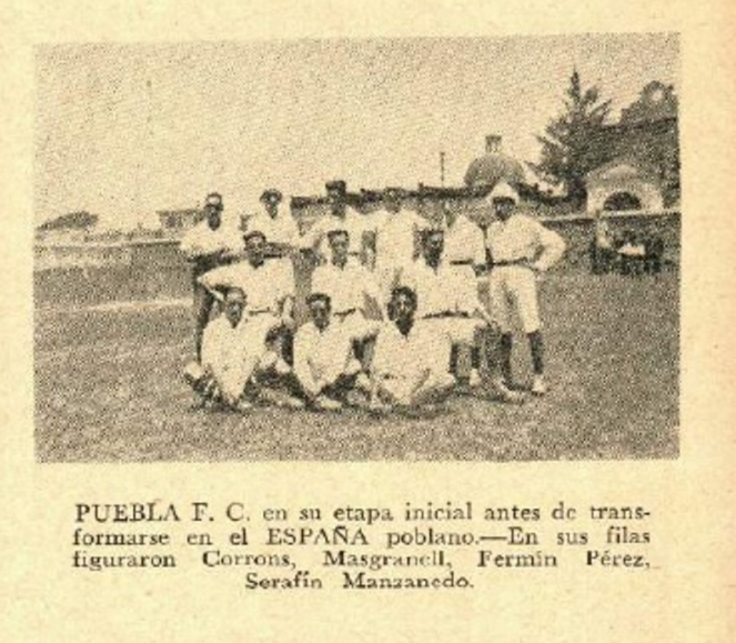 El equipo Puebla FC de la ciudad de puebla en 1915